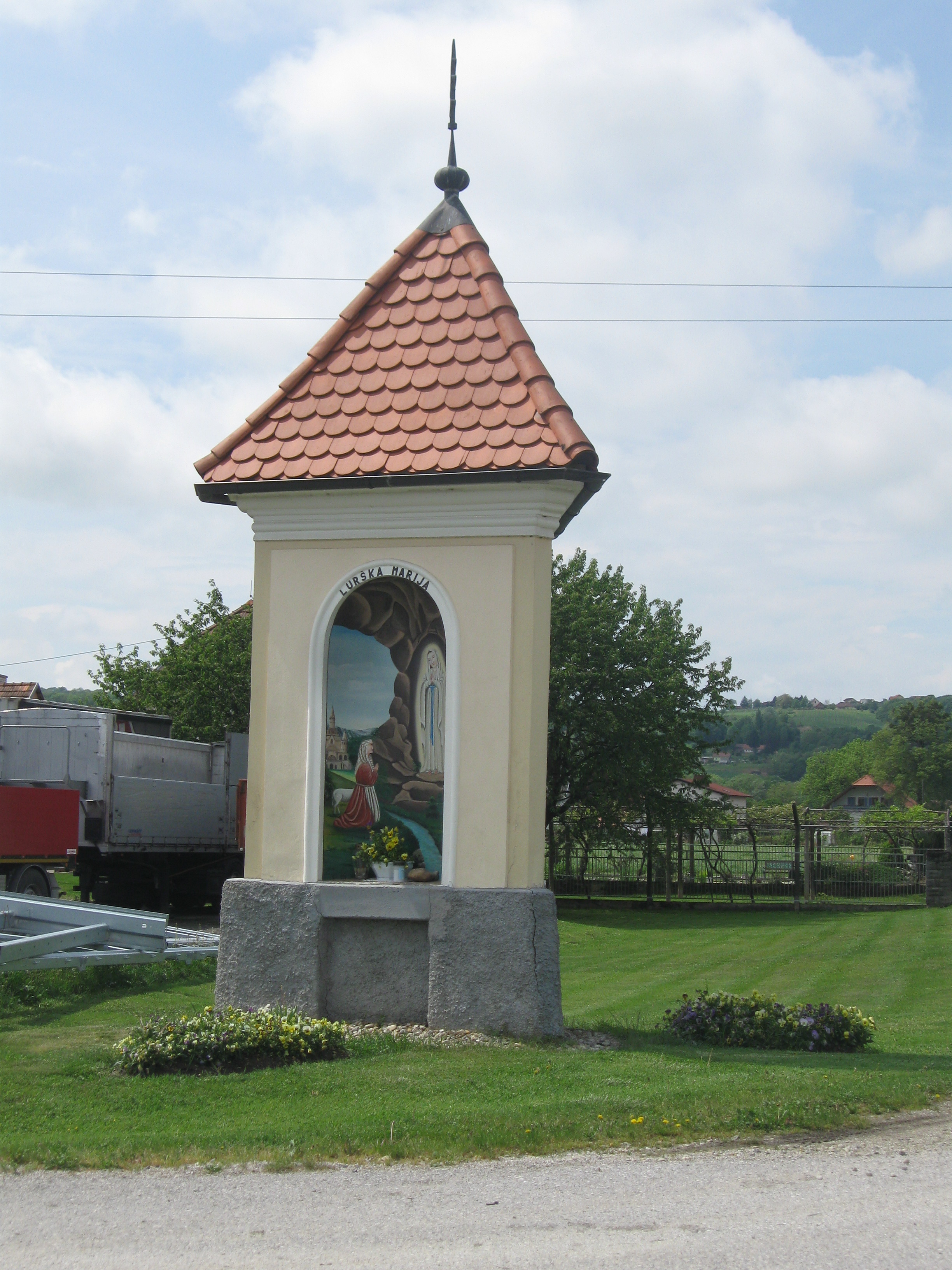 Trikotno znamenje iz 19. stoletja. Pokriva ga opečna streha. V nišah so novejše poslikave.